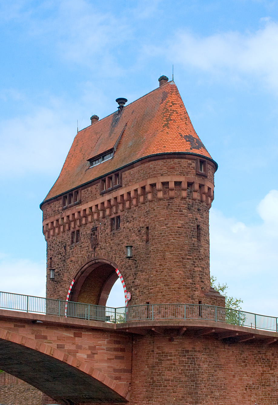 Brückentor der Mainbrücke Miltenberg über den Main in Miltenberg